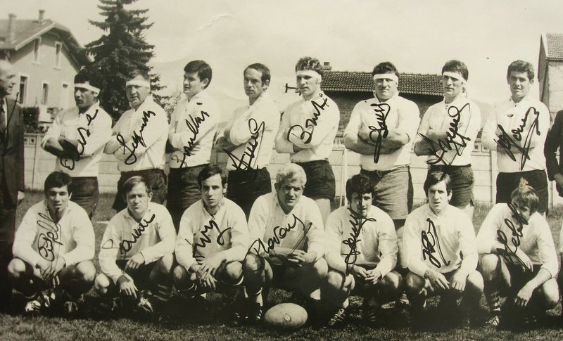 Equipe de Fumel - Vainqueur du Challenge de l'Espérance - 1970